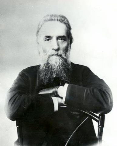 Управляющий Балтийским заводом генерал Михаил Ильич Кази.